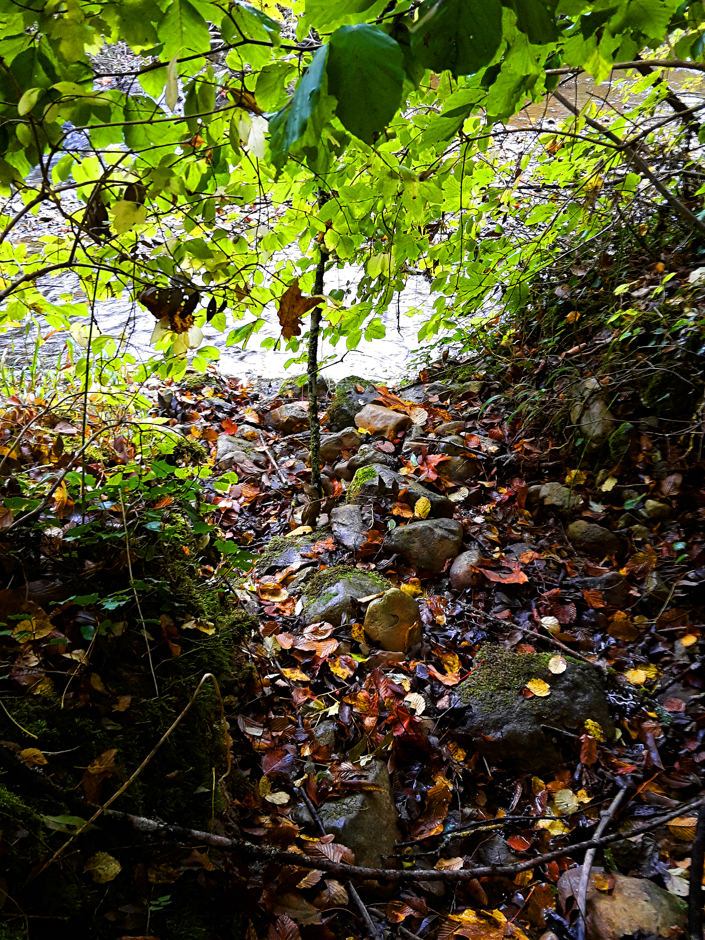 Mündung des Stigelmattbachs in die Reppisch